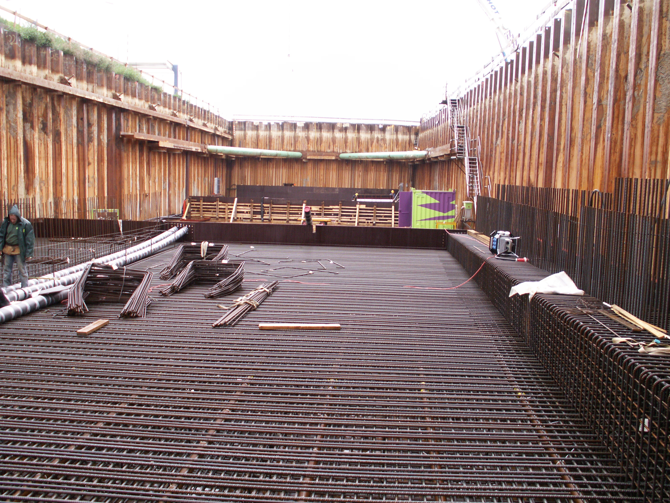 Buildingpit Aquaduct Galamadammen